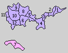 山口県大島郡の町村制時点の町村。